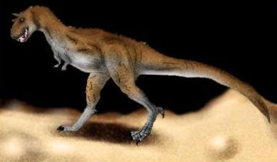 El drepedador de Bonaparte más singular.